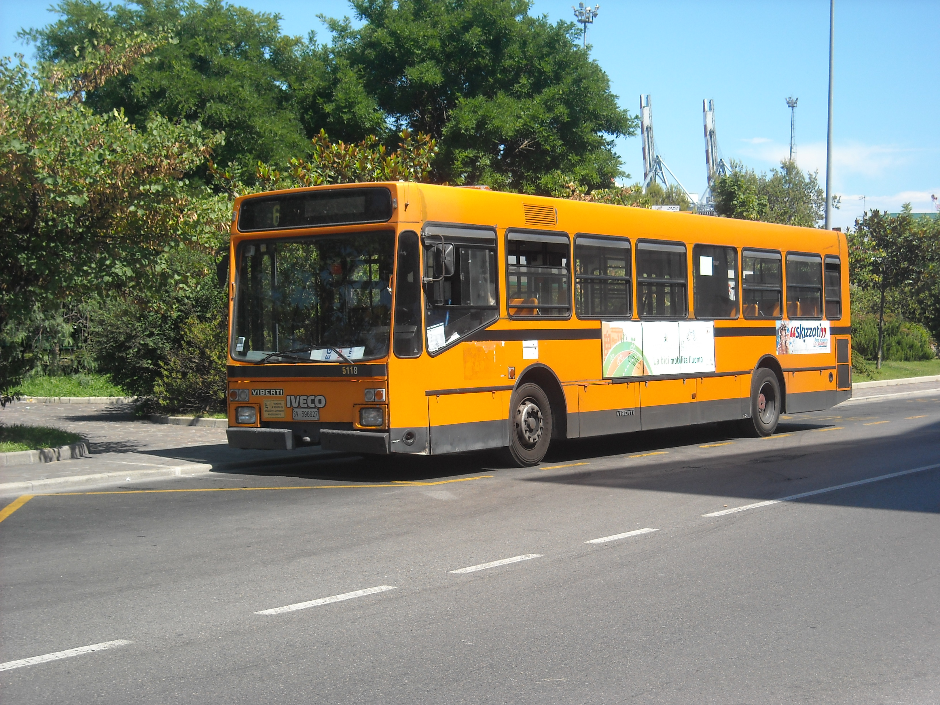 Iveco 480.12 della TPL Linea Savona